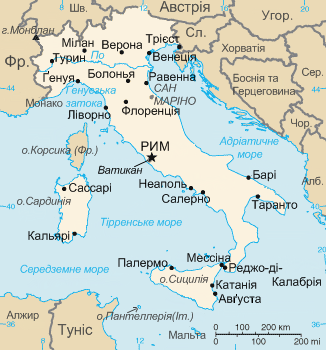 Мапа Італії.